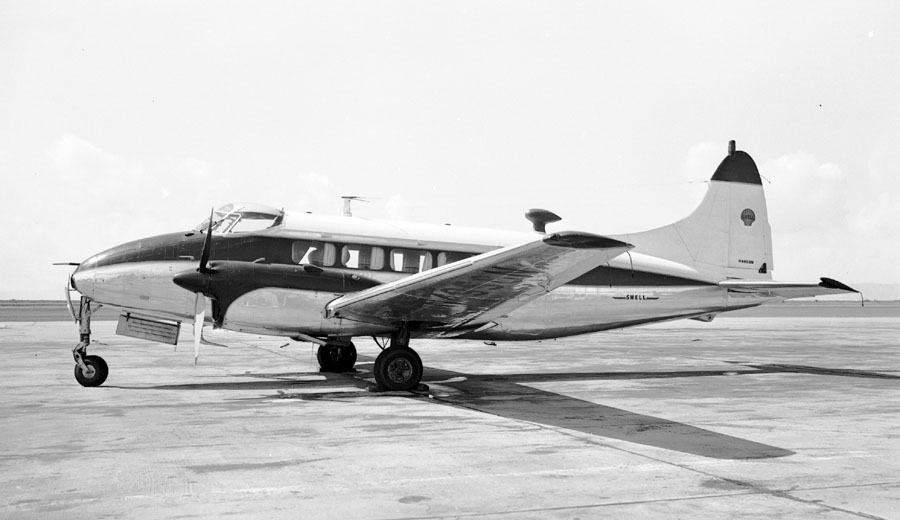 Oakland March 24, 1955.